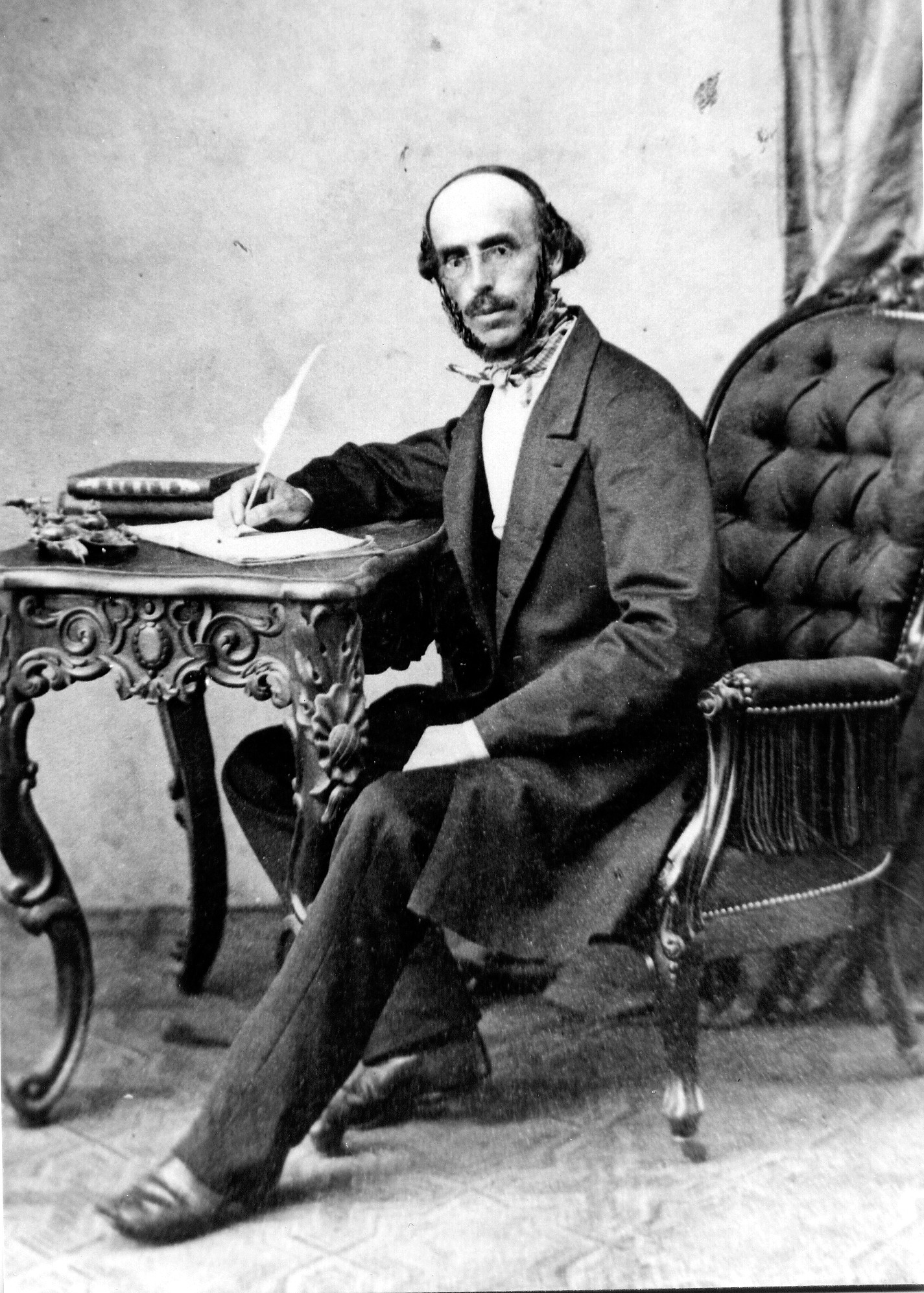 Bendermacher Matthias Konstantin Foto (Privatbesitz)